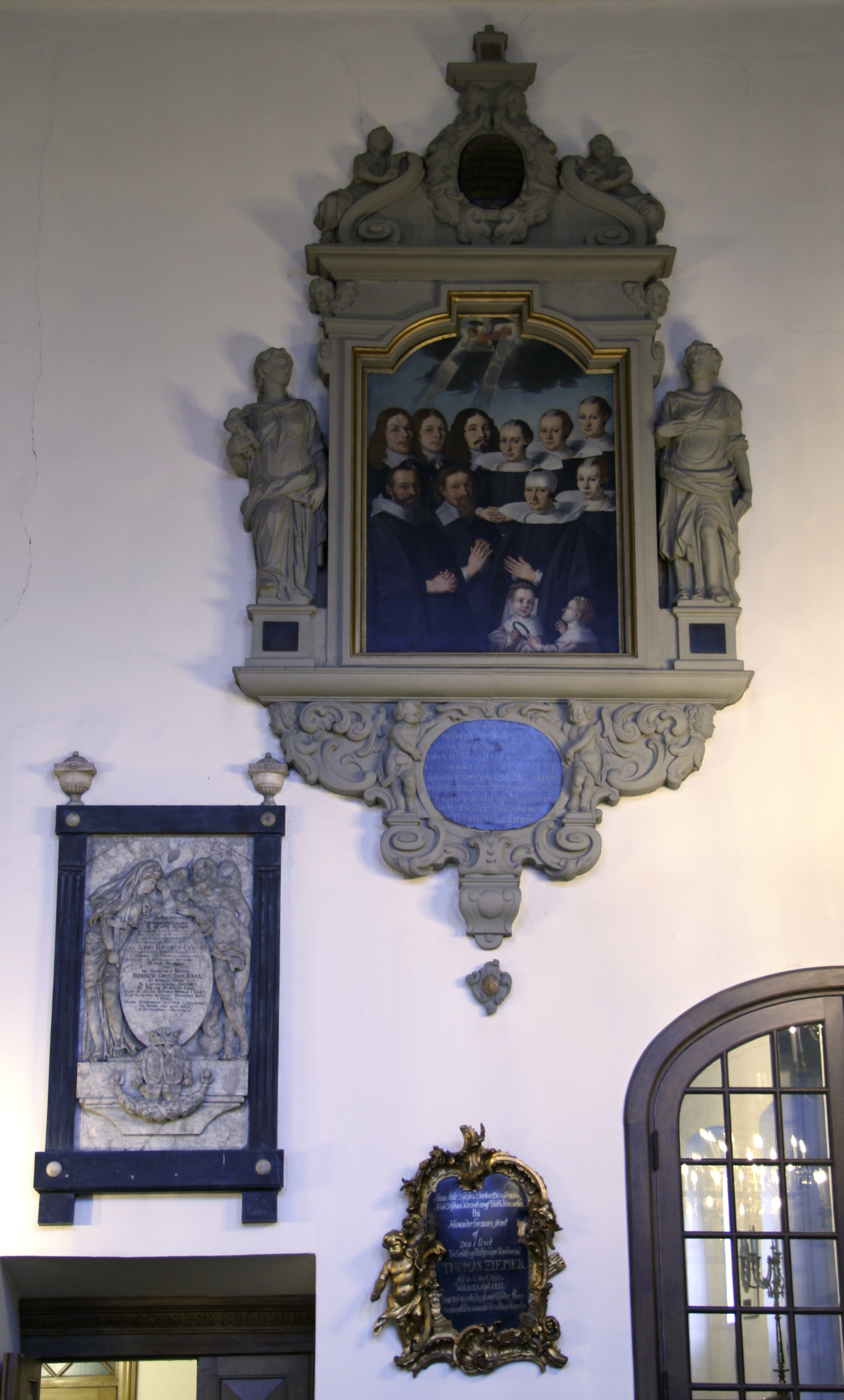 Holmens Kirke, Copenhagen, Denmark . Epitafier på korgangens sydvæg. Oppefra: Jacob Matzen, 1653, Sophia Elisabeth Charisius, 1769 og Thomas Ziemer, 1755.